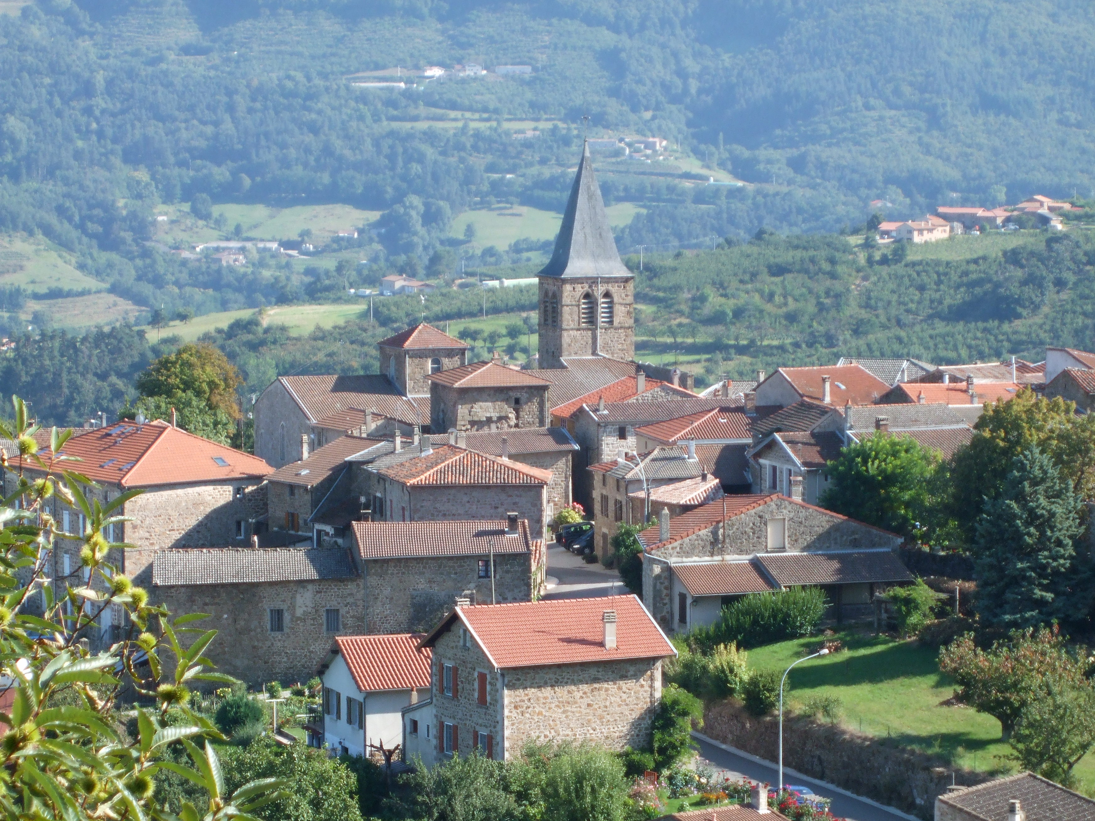 église Saint Michel